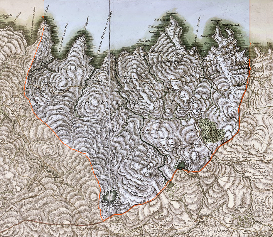 Province de Vico - Extrait de la Carta dell' Isola di Corsica de Domenico Policardi, cartographe (1769)